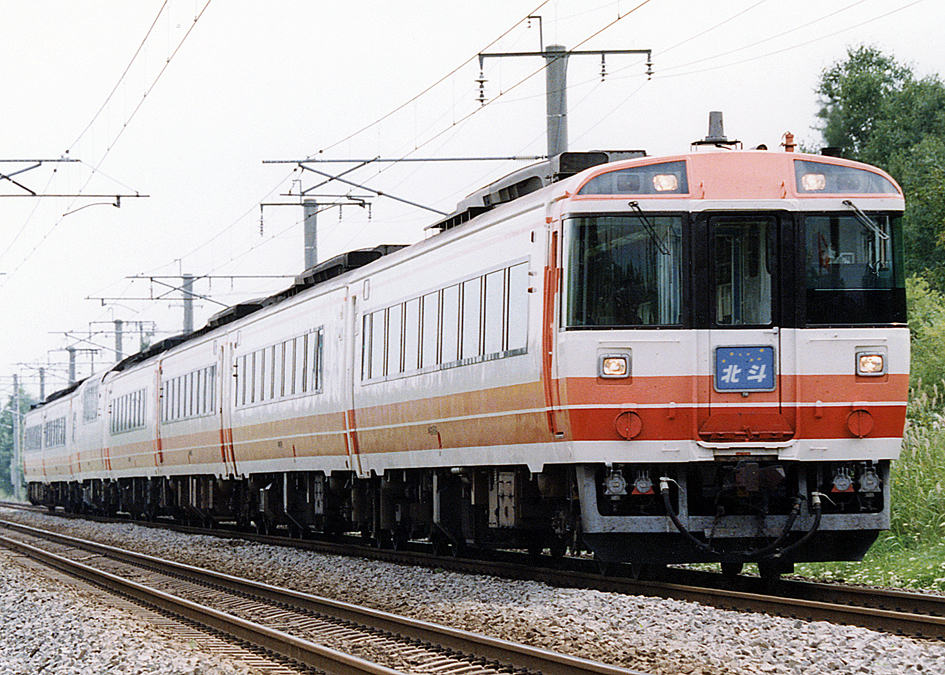 JR北海道 キハ183系特急形気動車 特急北斗 長都駅付近にて